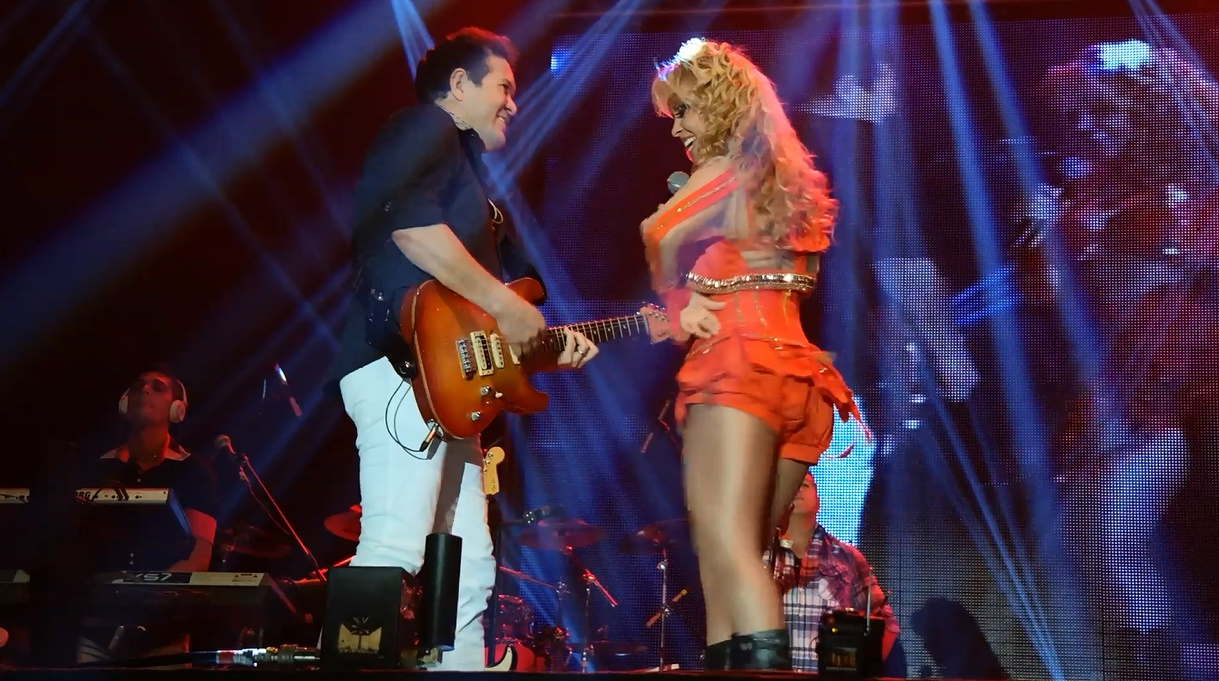 Banda Calypso no Studio 5 Festival Mall, em Manaus, em 2015.